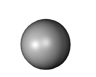 Exemple d'ombrage Phong. Source Image créée avec Blender (sous Linux).